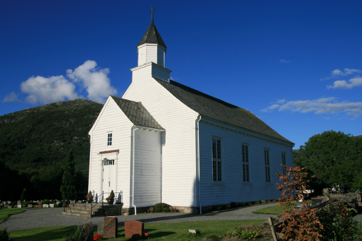 Vats kirke